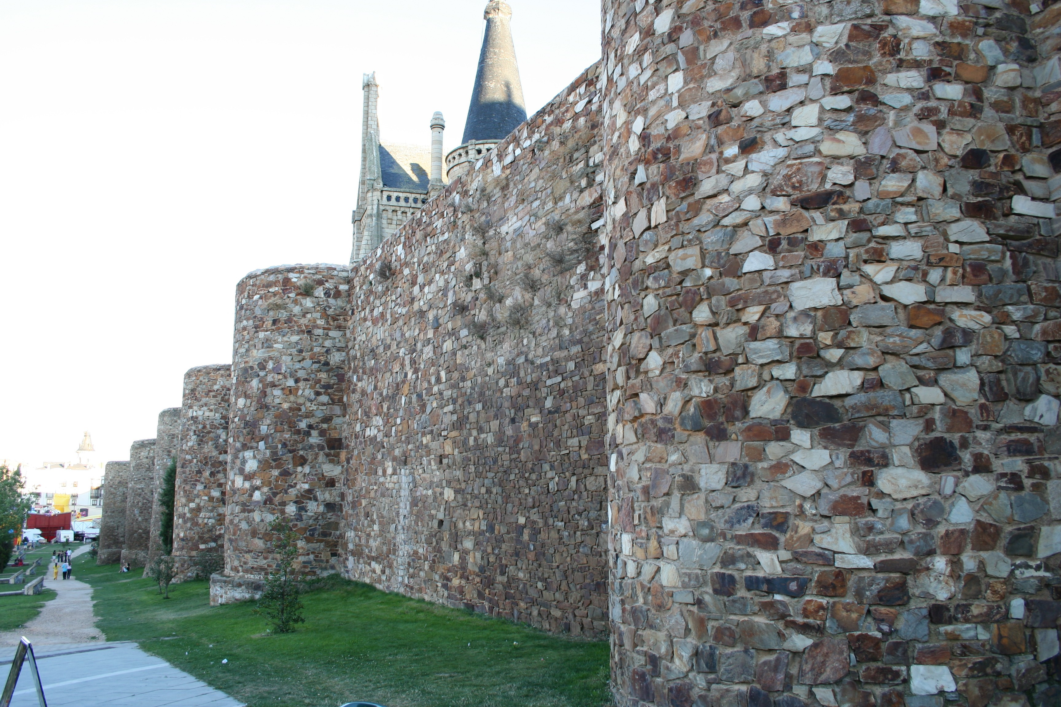 Vista exterior de la muralla